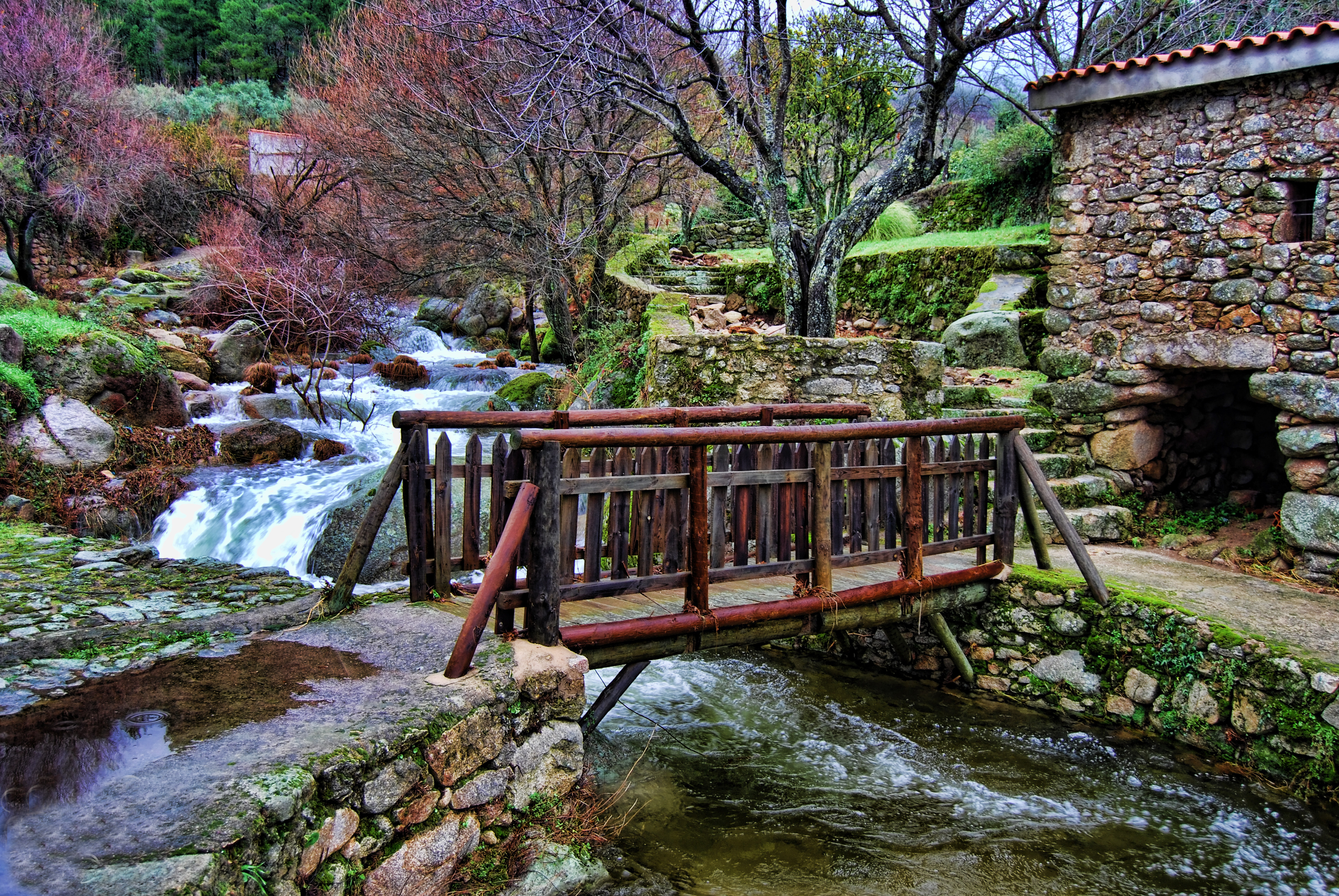 Fran gonzalez